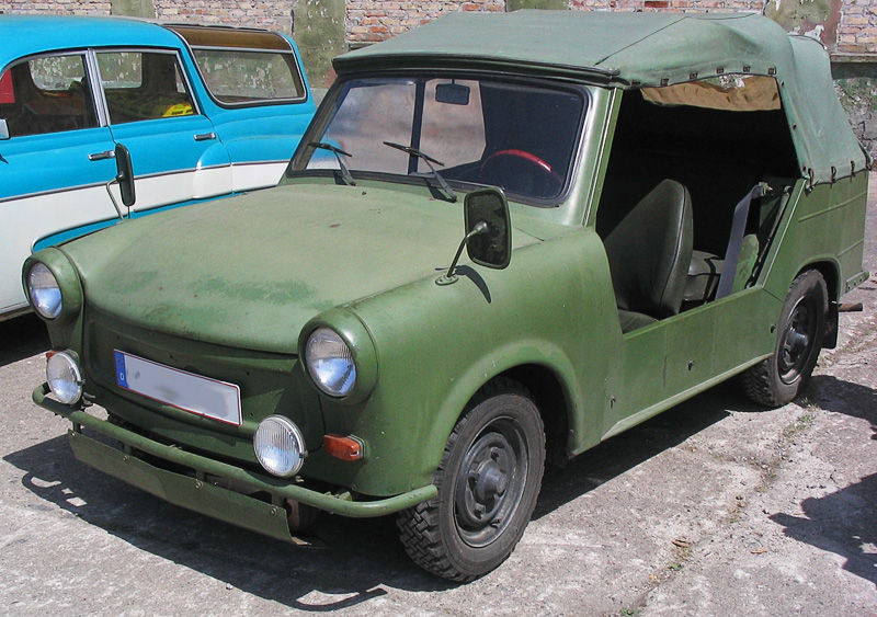 Beschreibung: Trabant 601 Kübelwagen - Militärversion der NVA Fotograf: Darkone, 2. Juli 2005